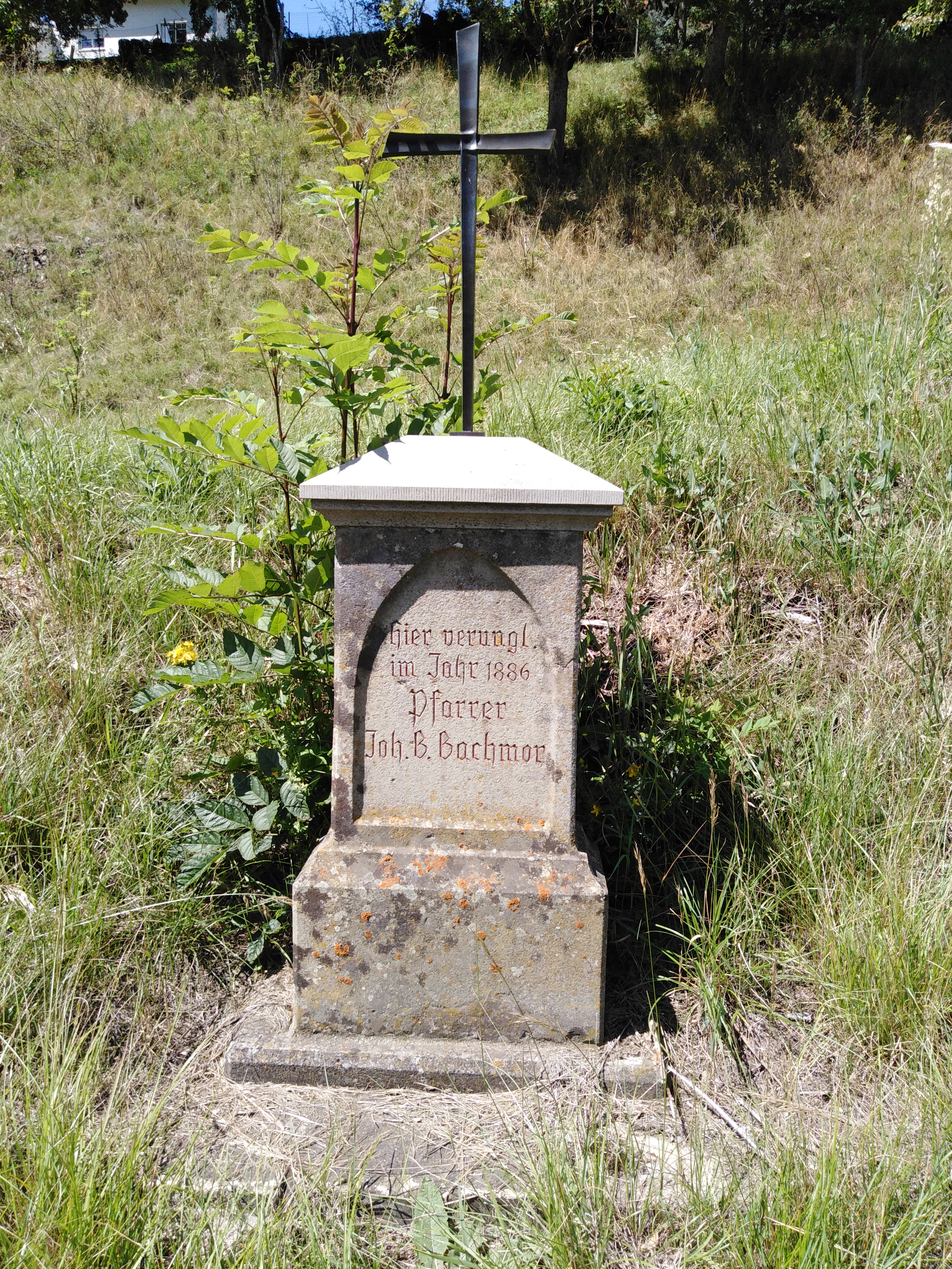 Boll, Steighalde - Unglückstelle Pfarrer Bachmor, Gedenkstein in sockelähnlicher Formgebung mit verbreitertem Fuß, quaderförmigem Mittelteil und schräger leicht überkragender Deckplatte mit Profilierungen. Im Mittelteil ein eingetieftes, spitzbogiges Inschriftfeld. Das ursprünglich auf dem Stein befestigte schmiedeeiserne Kreuz (Höhe=0,25 m) befand sich zum Zeitpunkt der Erfassung im Rathaus.(Stadtarchiv Oberndorf)